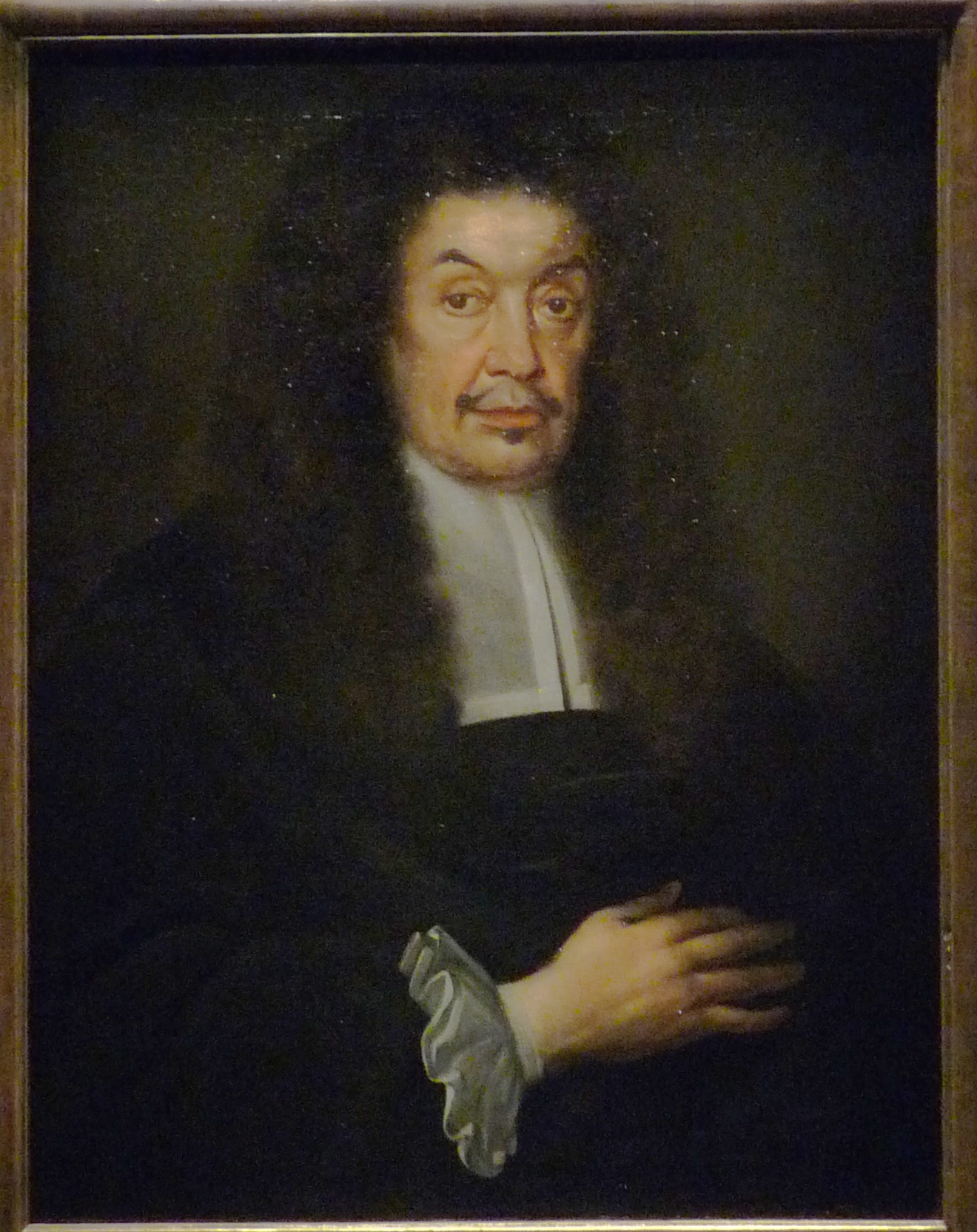 Johann Adam Schrag (1617-1687), juriste et diplomate, huile sur toile de Barthélémi Hopfer (1628-1699), 1687 (Musée historique de Strasbourg)